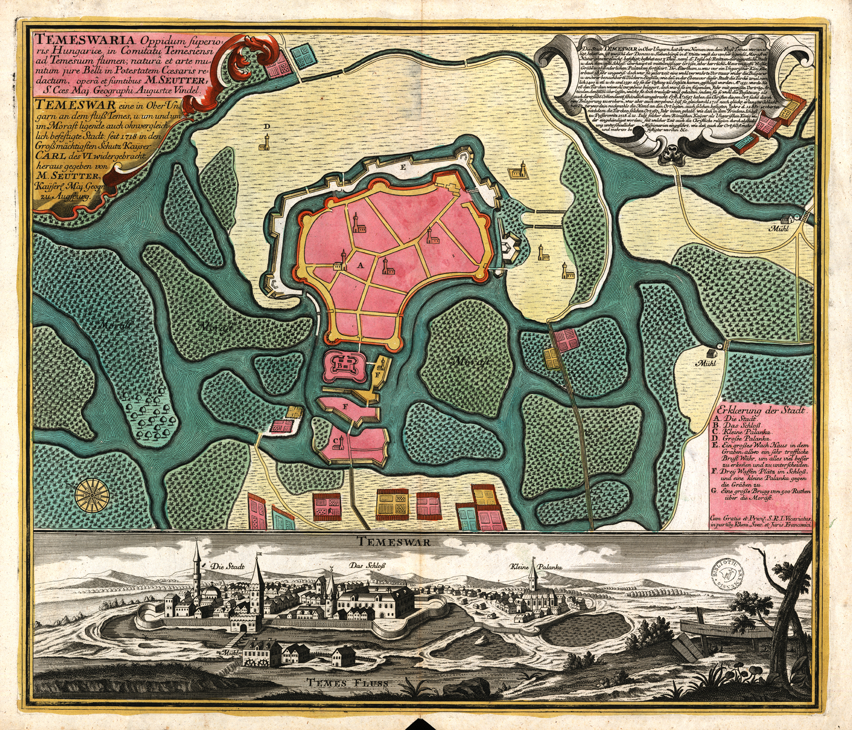 Temeswaria : oppidum superioris Hungariae. Temesvar * Stadtplan * Fortifikationsplan